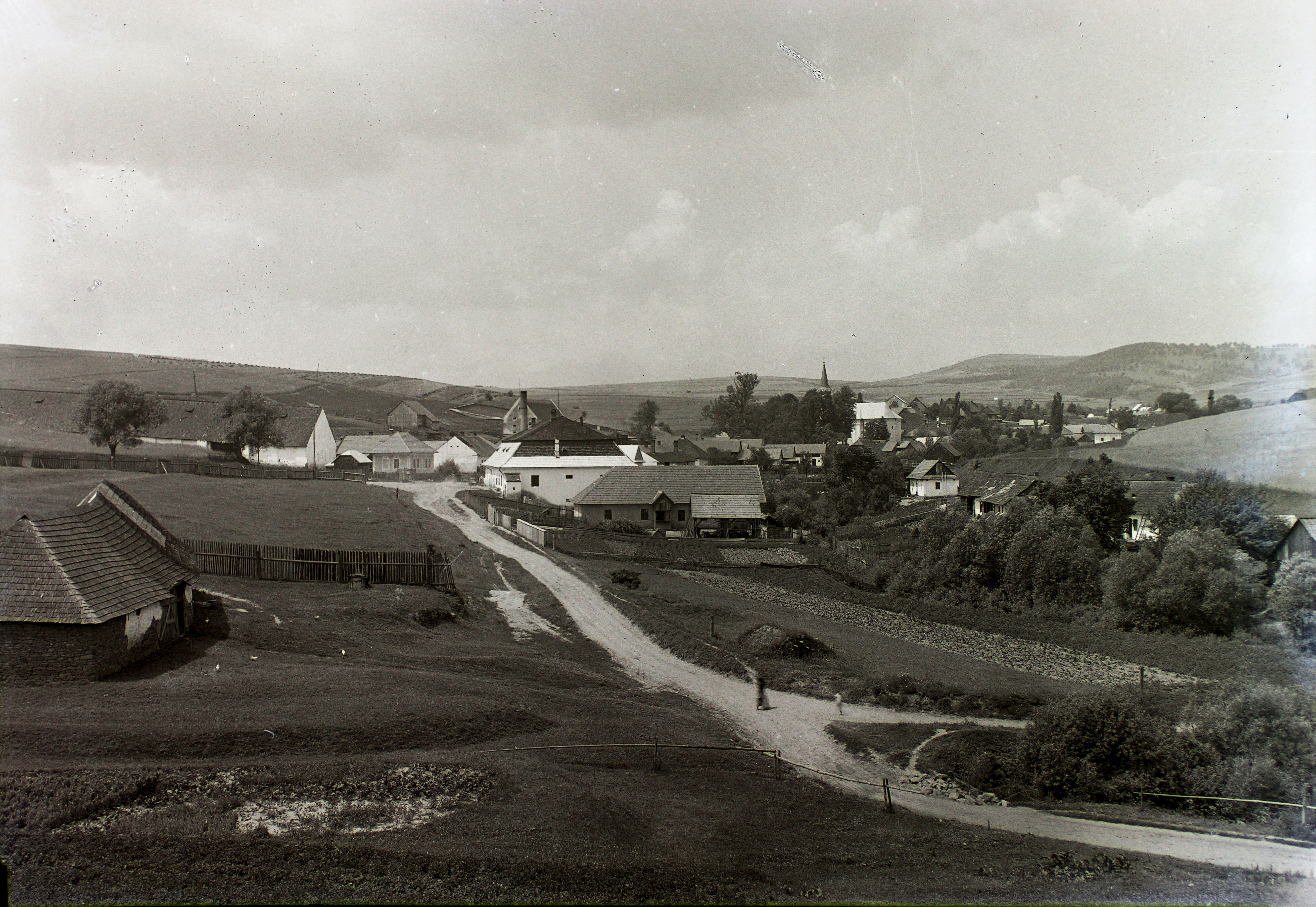 a község látképe. Location: Slovakia, Iliašovce Tags: Czechoslovakia Title: a község látképe.